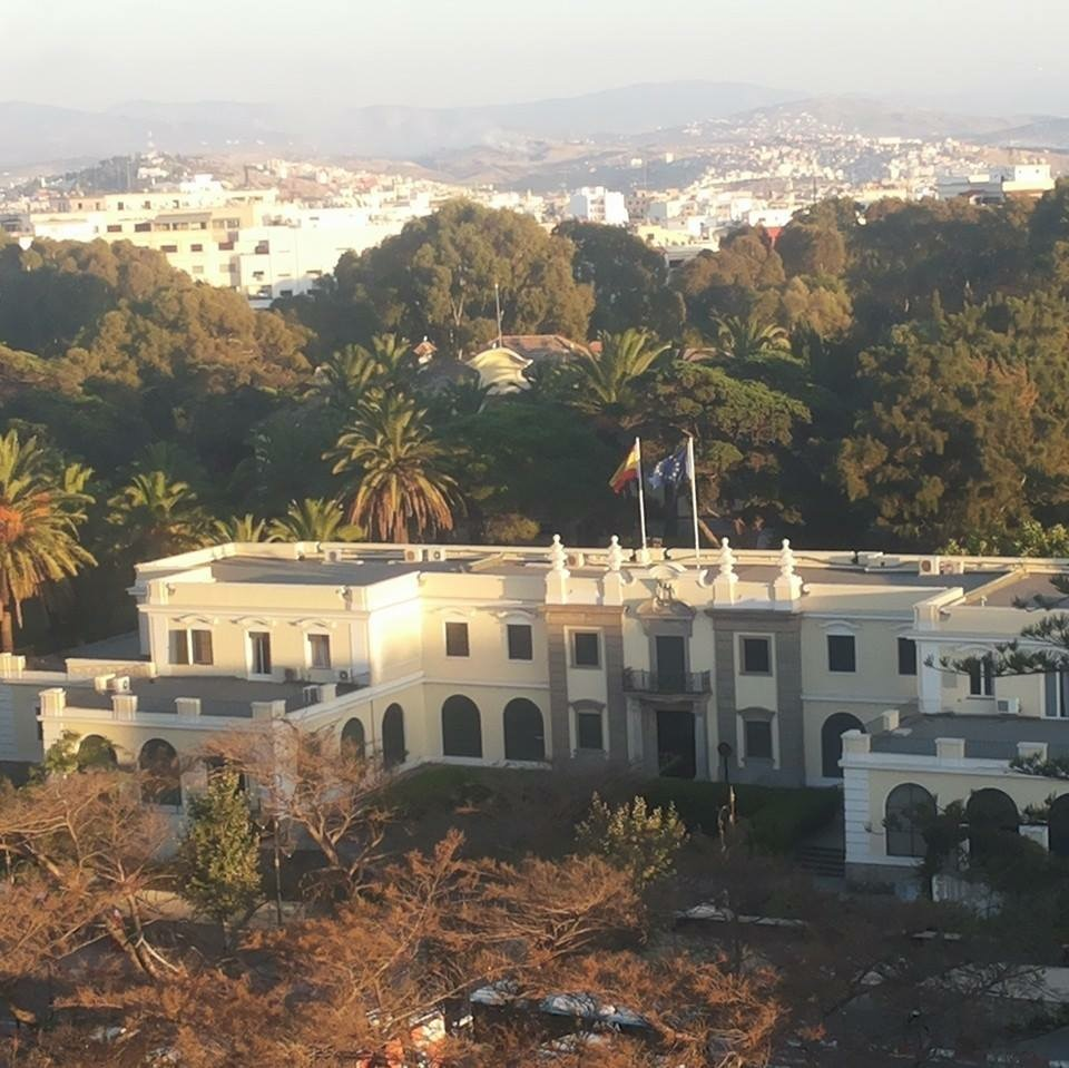 Consulado General de España en Tánger